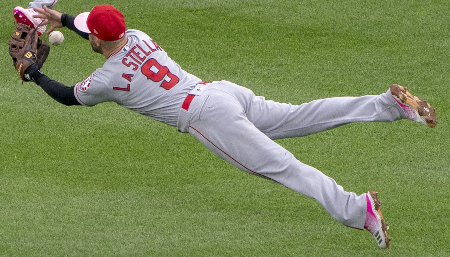 Angels at Orioles 5/12/19